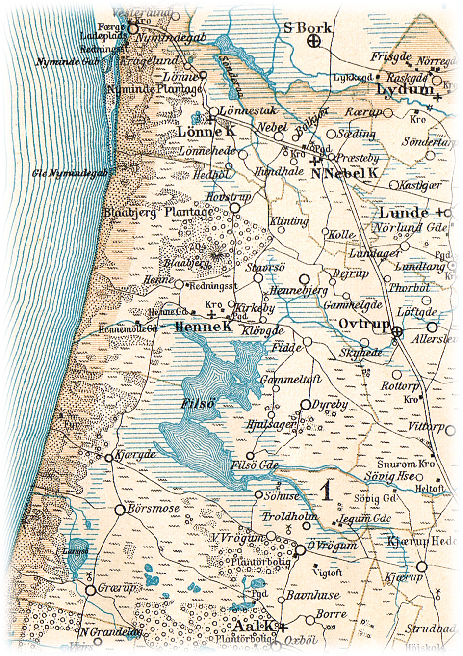 Kort over den afvandede Filsø den nordvestlige del af Ribe Amt